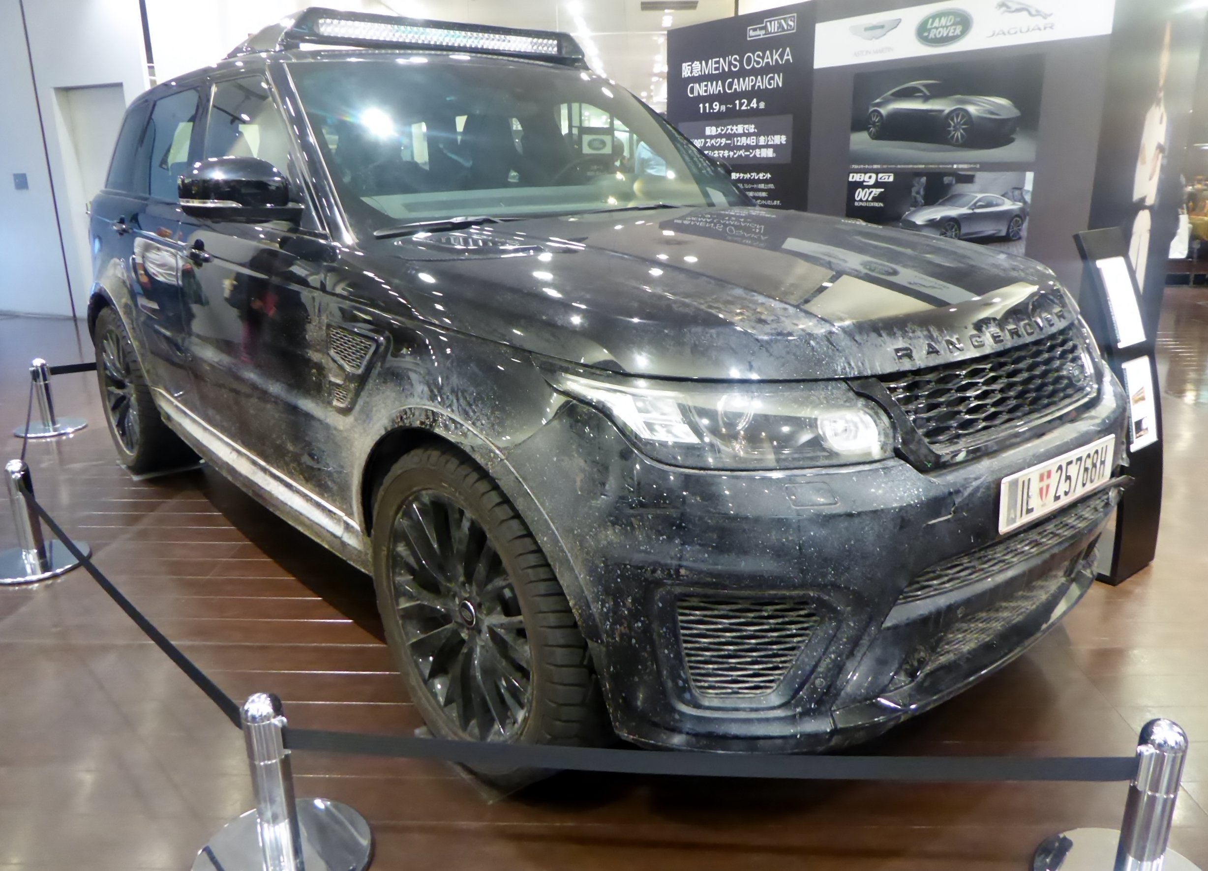 阪急メンズ大阪において展示されている「007 スペクター」において用いられたL494型ランドローバー・レンジローバースポーツSVRをフロントから撮影。